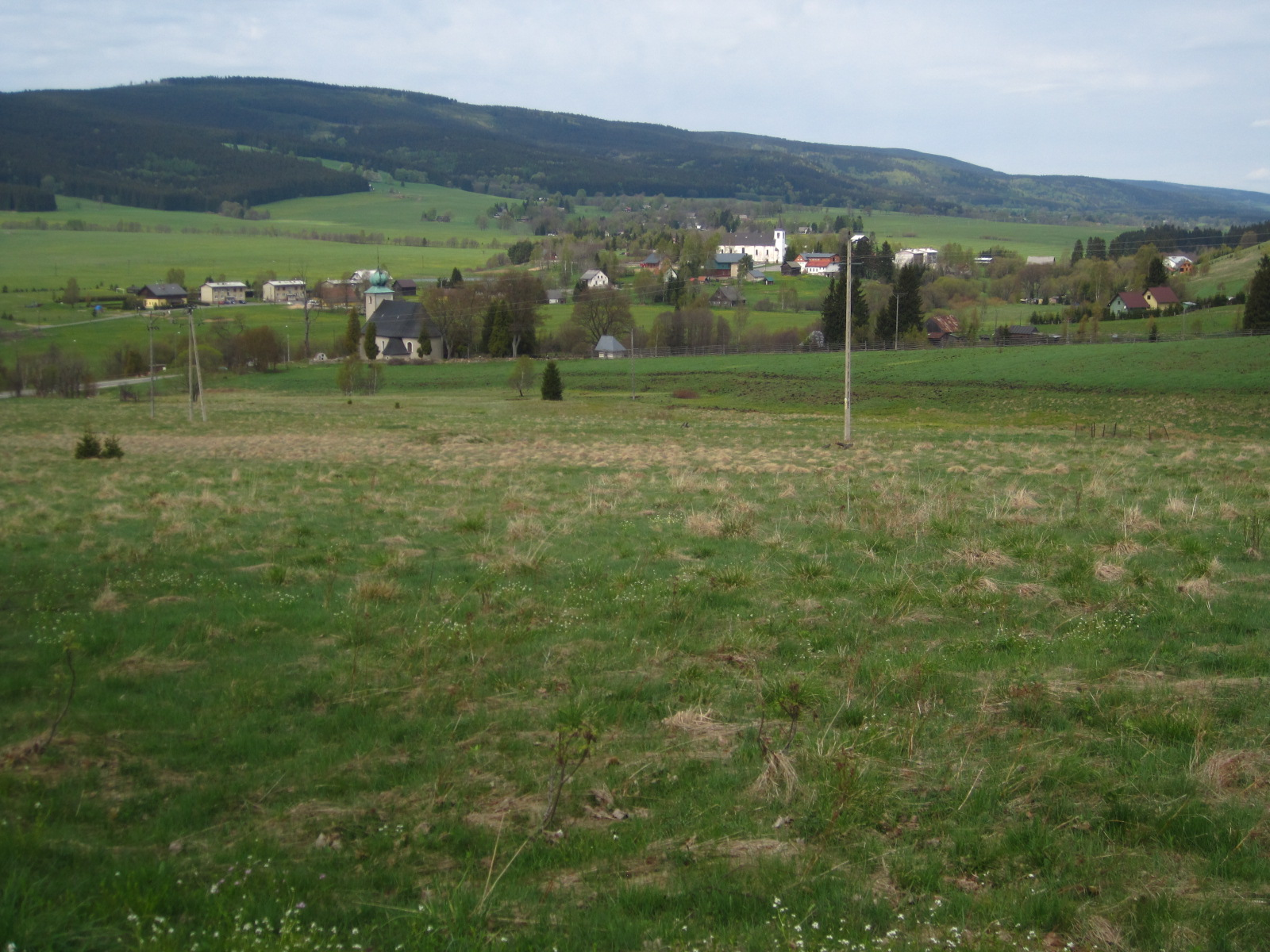 Orlické Záhoří-Kunštát z polské strany